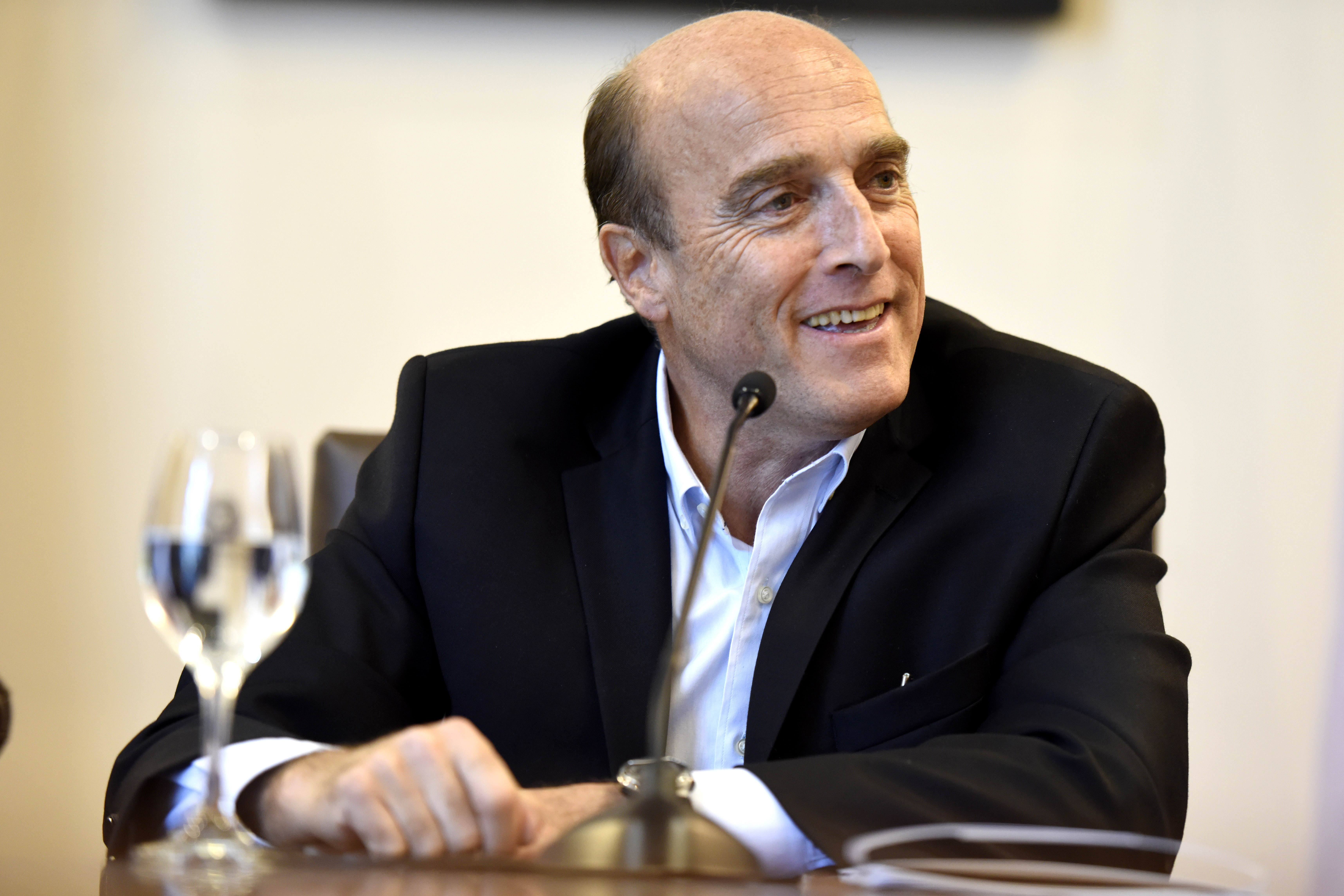 Daniel Martínez, intendente de Montevideo.